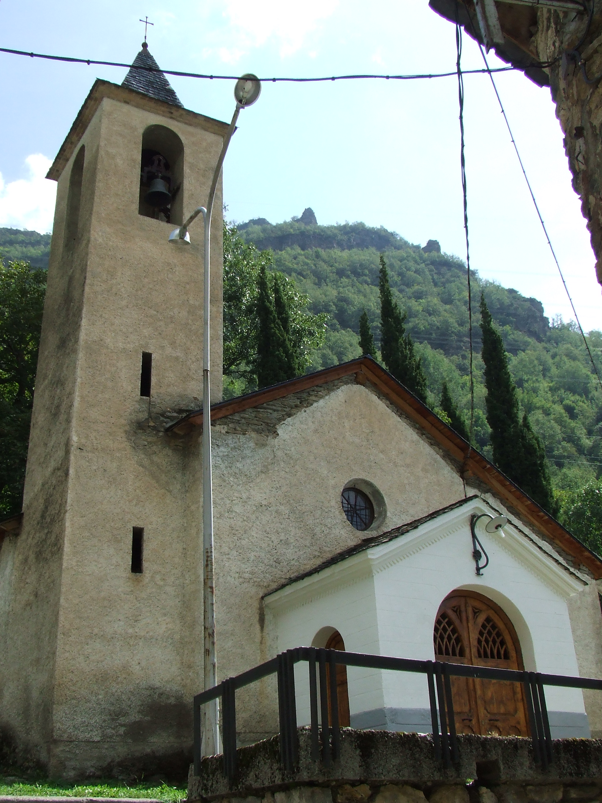 Sant Martí de la Torre de Cabdella (Pallars Jussà)